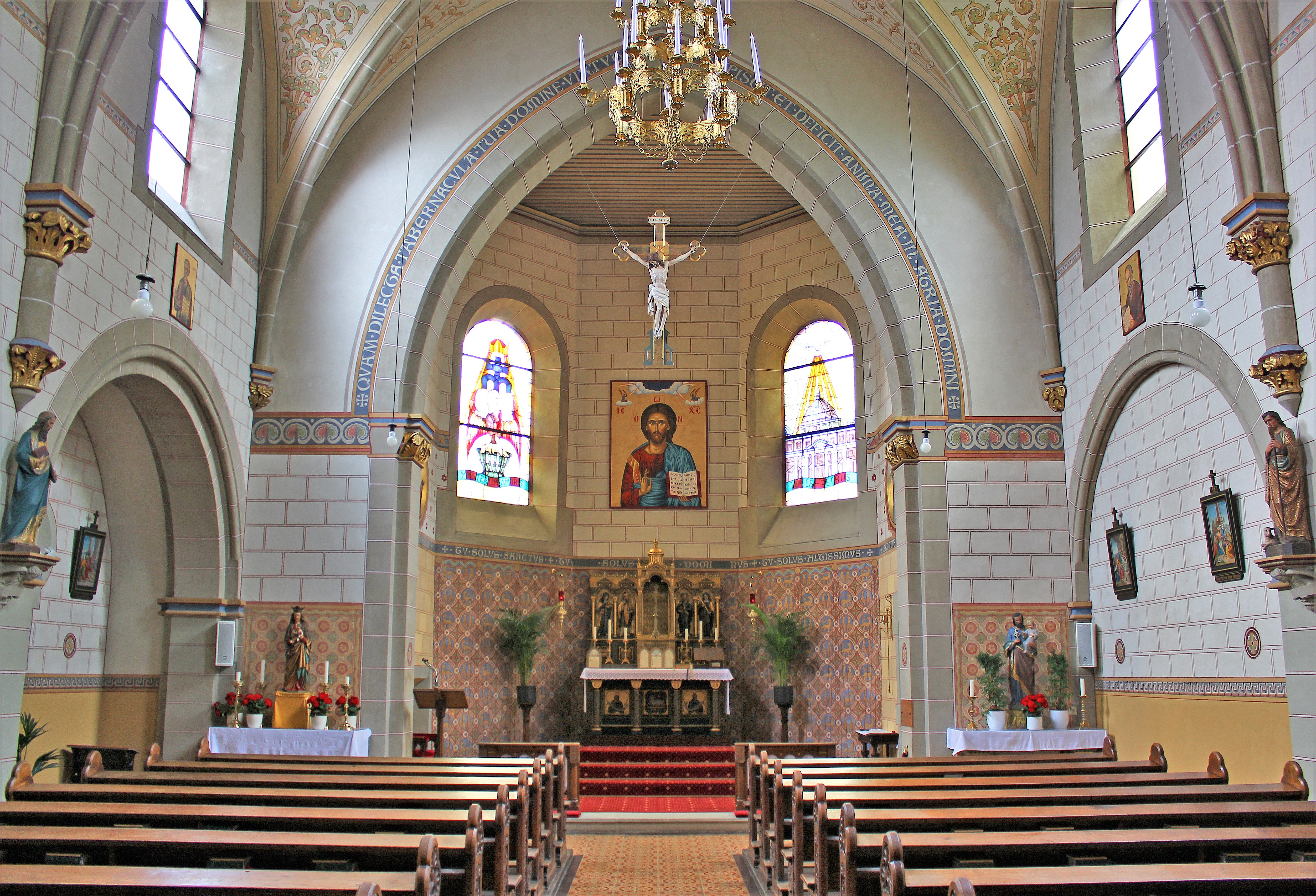 Blick ins Innere der kath. Kirche St. Petrus Canisius in Saarlouis, Saarland.